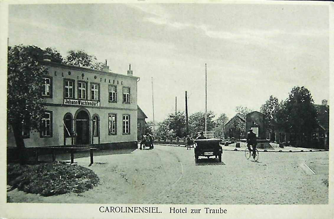 Das alte Hotel zur Traube in der Ortsmitte von Carolinensiel, dahinter, auf der rechten Seite sieht man das Kriegerdenmal für die Gefallenen des 1. Weltkrieges. Heute nicht mehr vorhanden. Das Photo zeigt den wiederaufkommenden Tourismus, Automobil, in den 20er Jahren. 2010 wurde das Gebäude wieder umgebaut, renoviert und beherbergt das Aparthotel Harleblick.